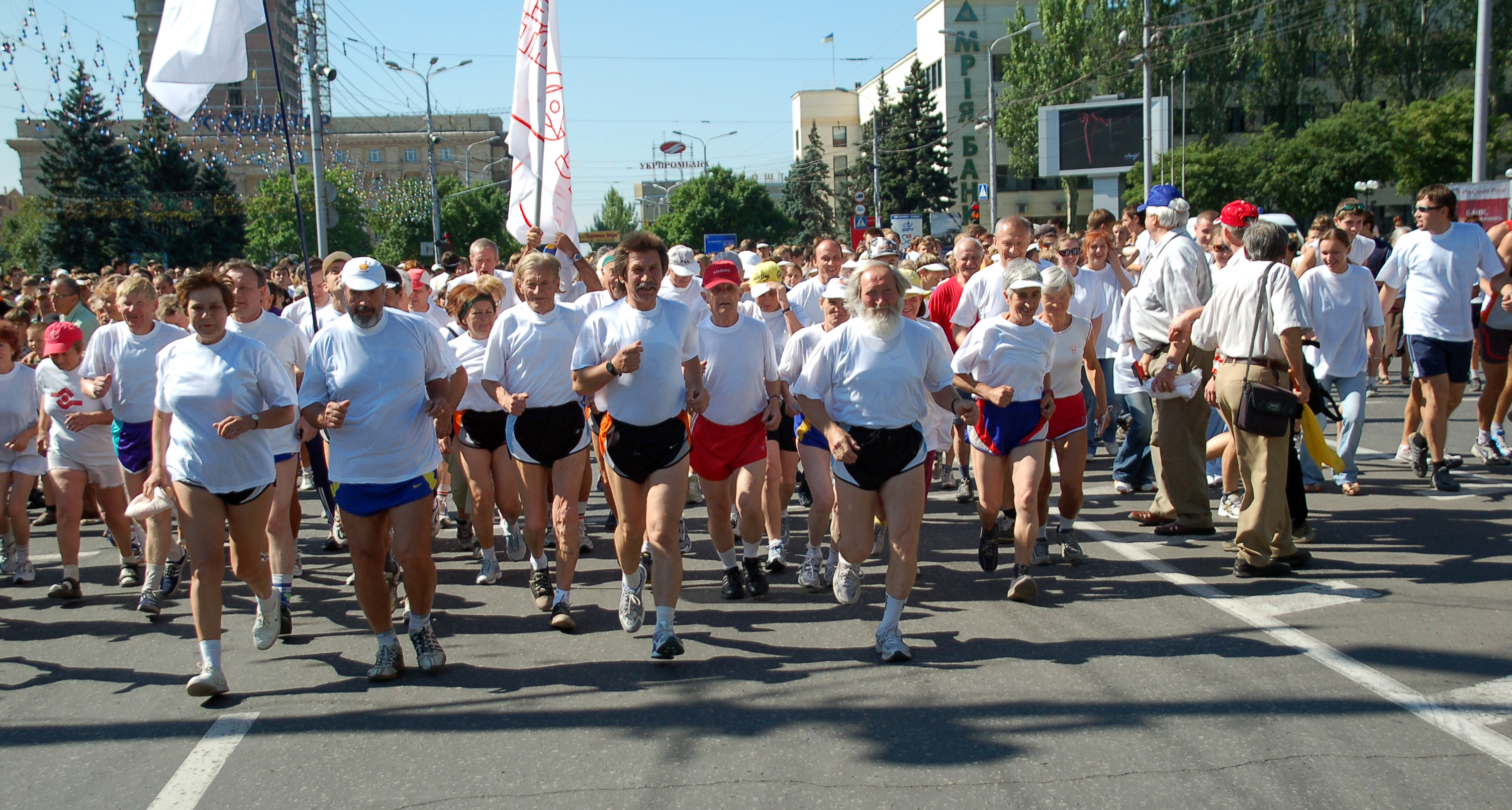 Забег